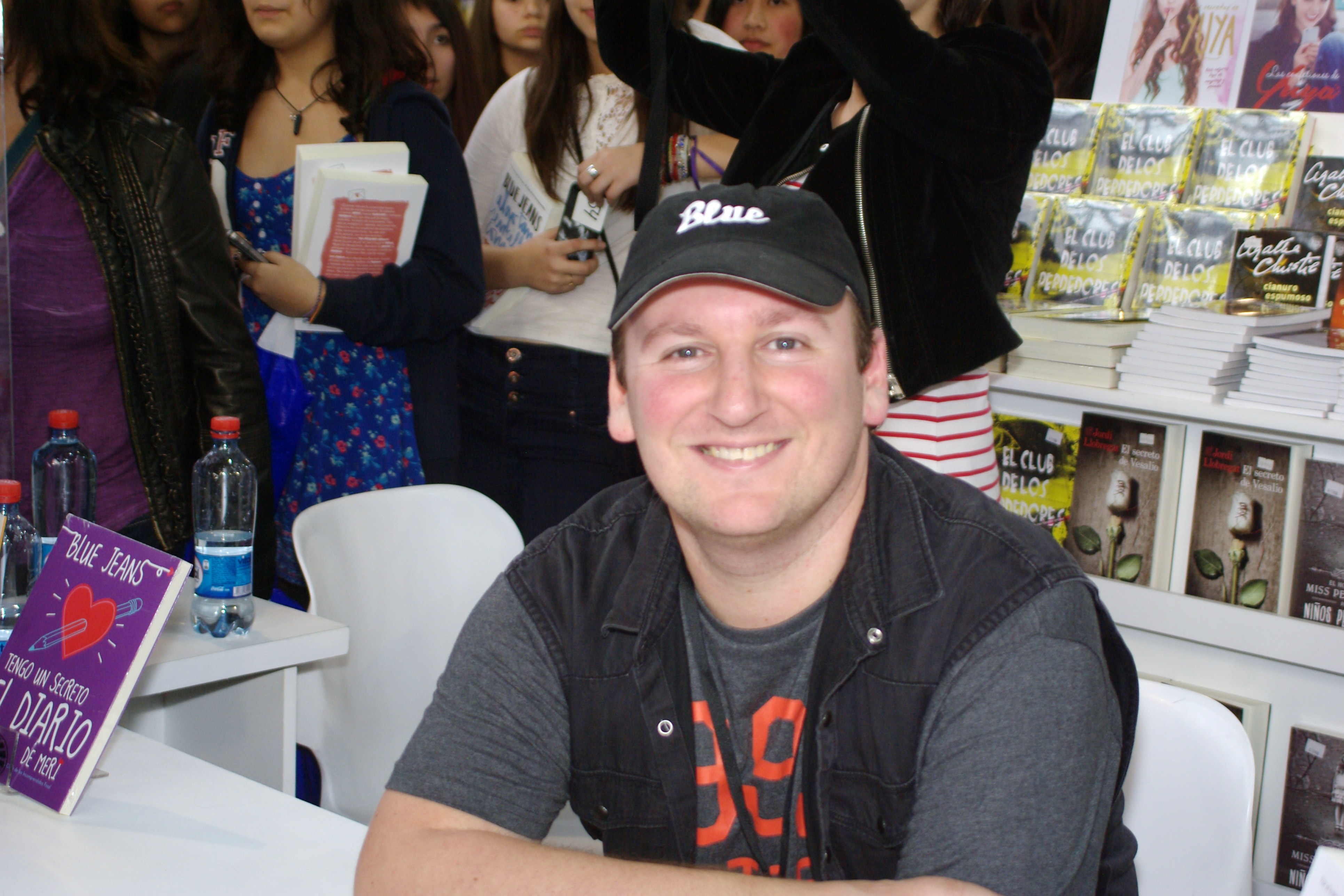 El escritor español Blue Jeans en la Feria Internacional del Libro de Santiago 2015